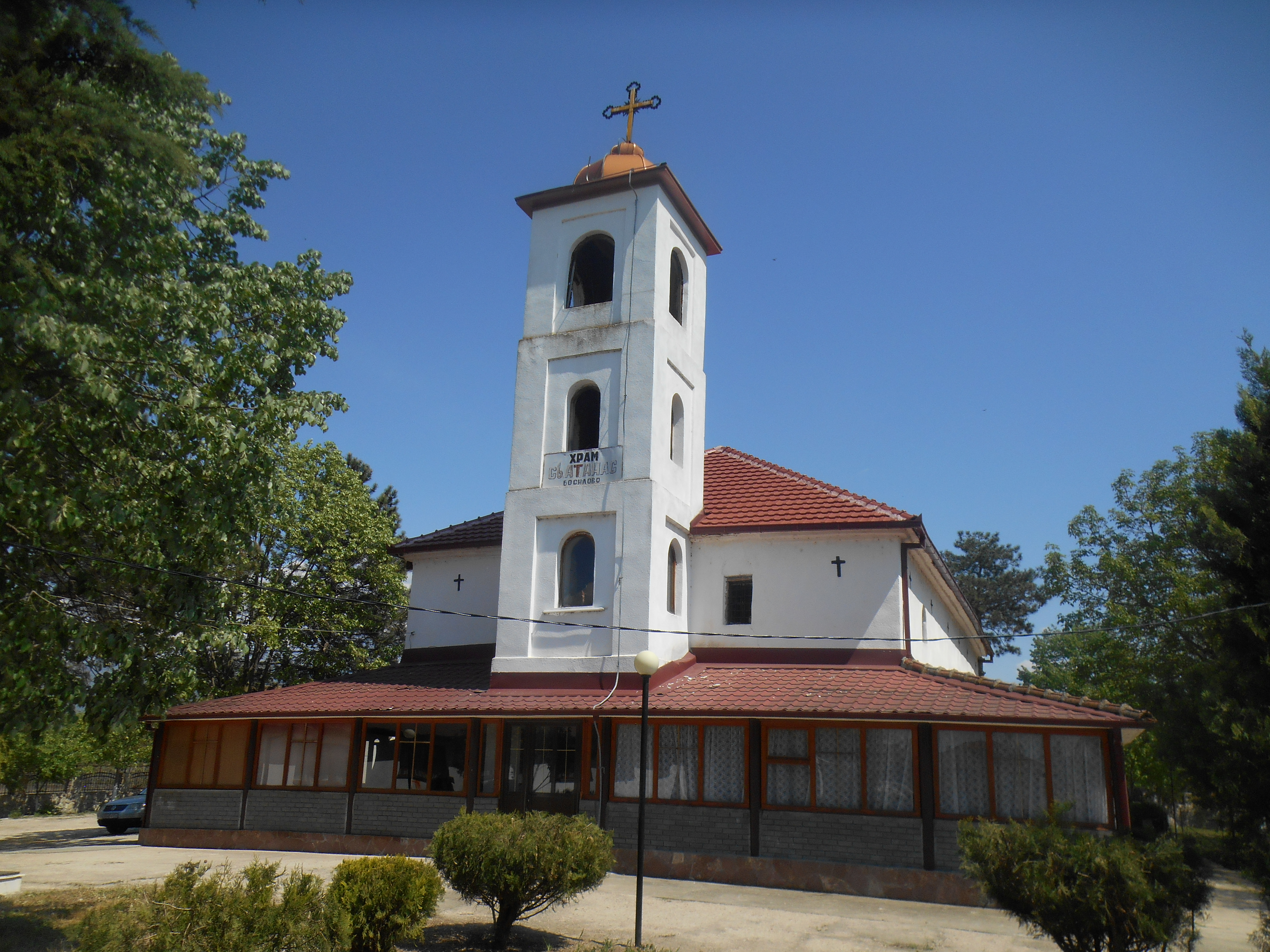 Црква „Св. Атанасиј“ - Босилово